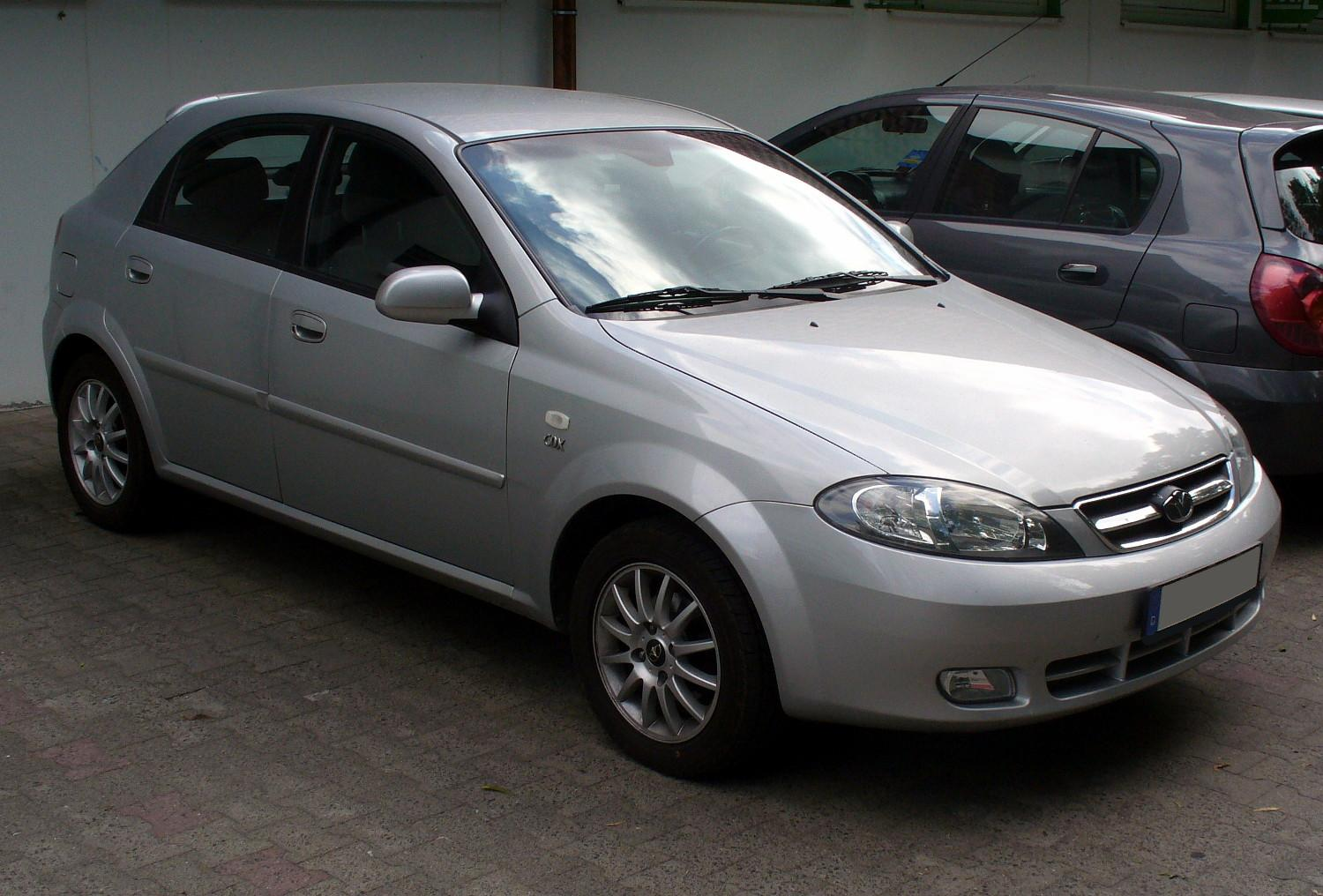 Daewoo Lacetti CDX